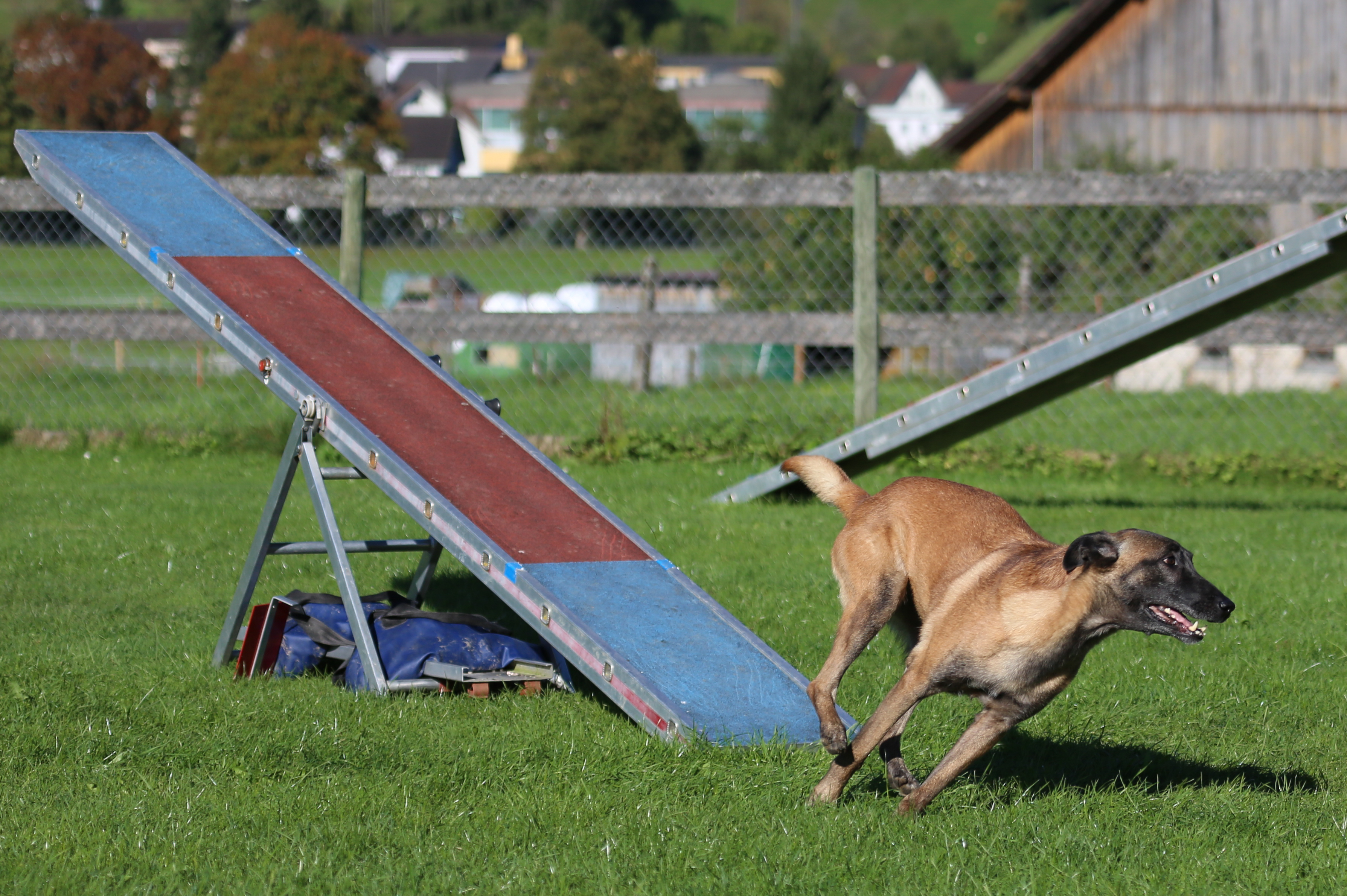 Agility-Wettkampf in der Ostschweiz – Malinois beim Verlassen der Wippe